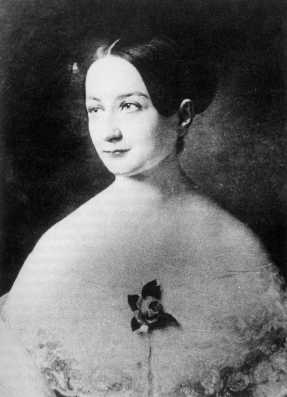 Kánya Emília portréja (Pest, 1830. november 10. – Fiume, 1905. december 29.) író, újságíró, lapszerkesztő